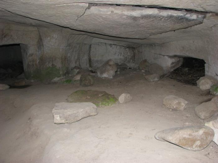 Necropoli di Luzzanas